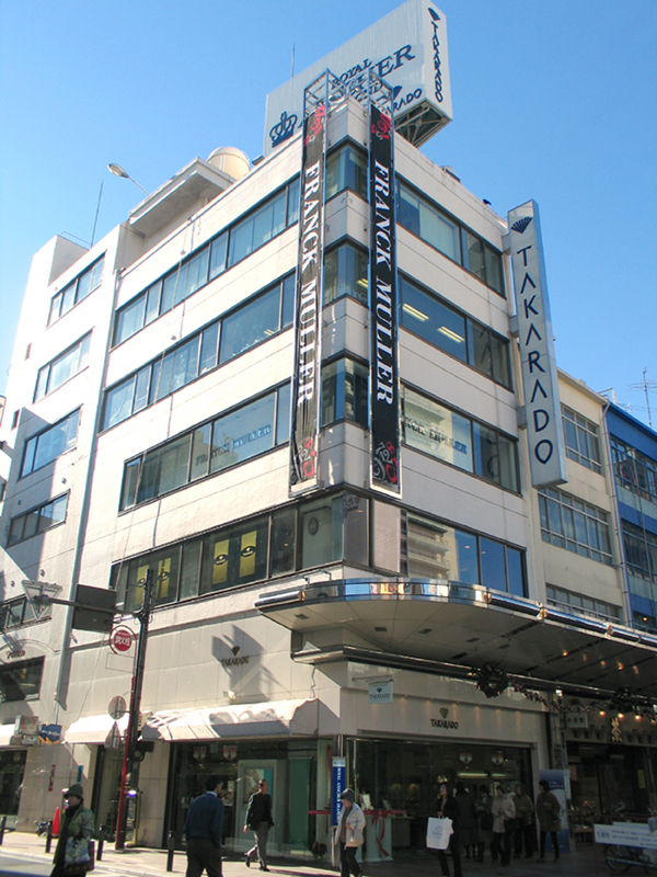 タカラ堂静岡本店